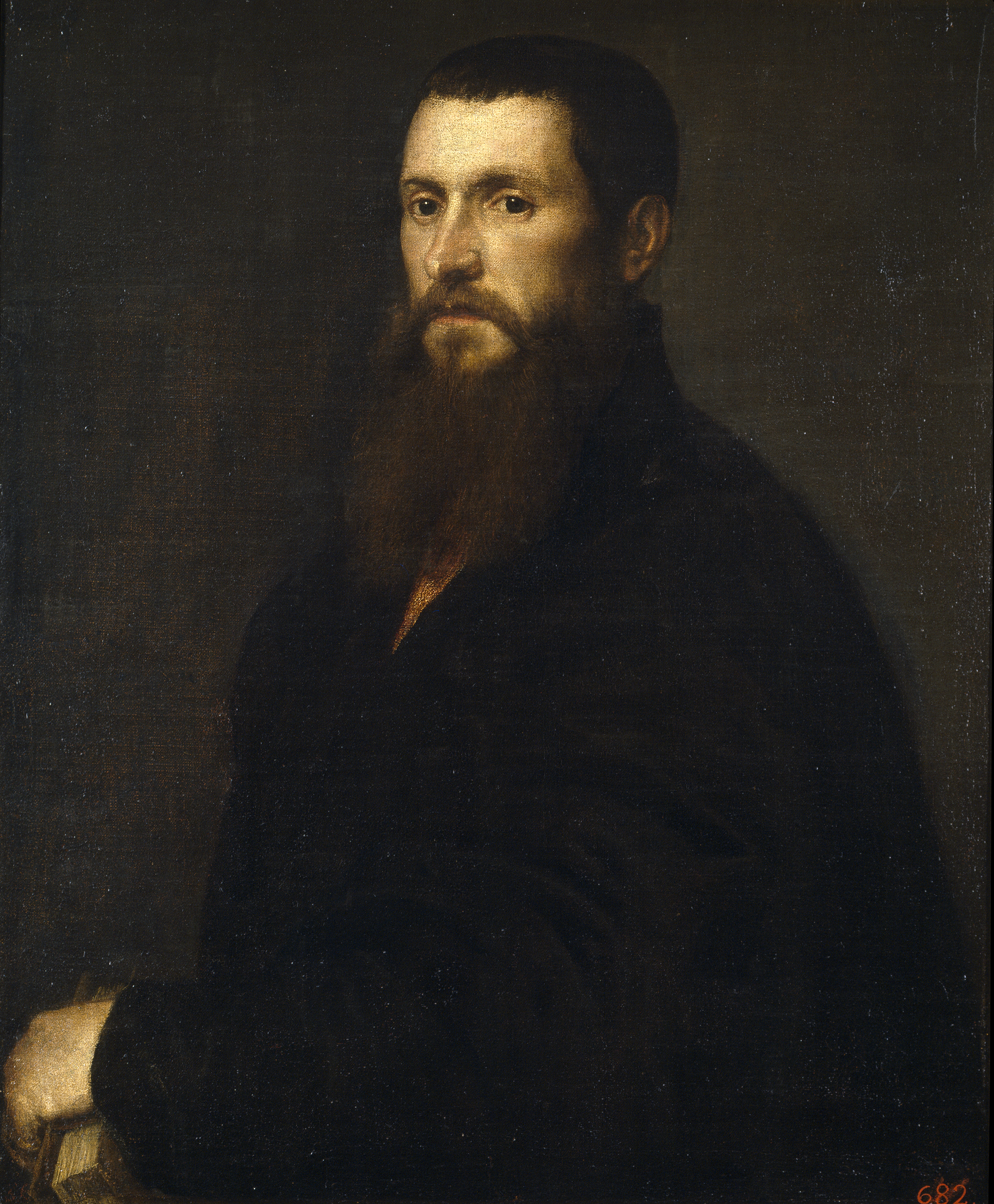 Retrato del humanista y eclesiástico Daniele Barbaro (1514-1570), que destacó como óptico y llegó a ser patriarca de Aquileya y cardenal de la Iglesia Católica.